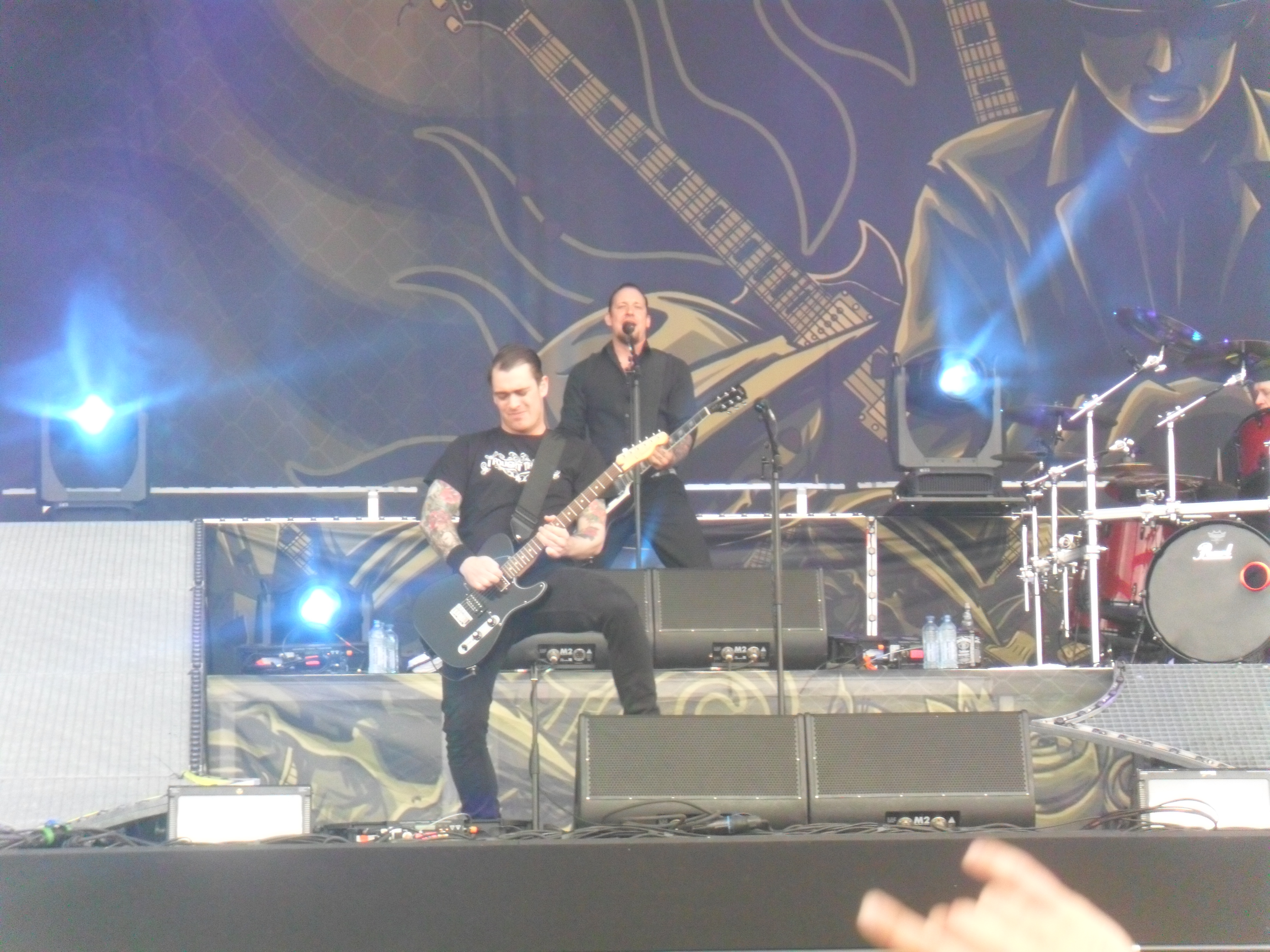 Optreden van Volbeat op dag 3 van Pinkpop 2011